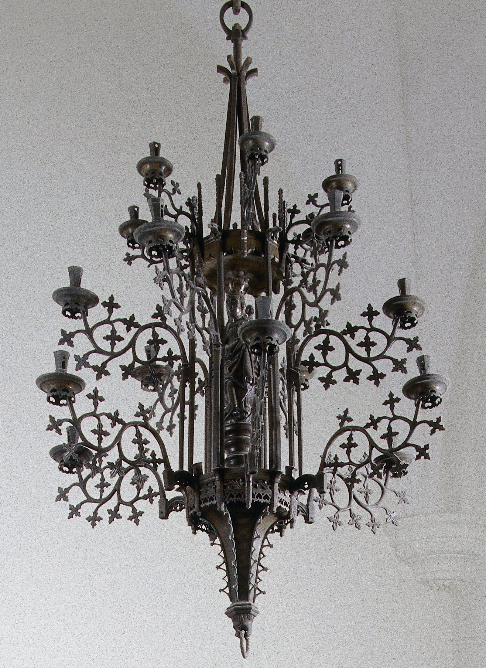 Het voorwerp bestaat uit een groot aantal onderdelen. De stam wordt ingenomen door zes van spuwers en steunberen voorziene spijlen, die een kapel vormen met het twaalfhoekige voetstuk op een zeszijdige console, eindigend in een leeuwenkop met trekring, en met de van twaalf pinakels voorziene kap. Op het voetstuk Maria met het Kind, staande op de maansikkel en omgeven door een stralenkrans. Op de kap is een uit zes staven samengestelde spits aangebracht, overgaande in een stang, waaraan de ovale hangring is geschroefd. Telkens zes armen zijn bevestigd aan het voetstuk, de kap en het midden van de spijlen. Deze zijn twee maal gebogen en hebben elf of vijf bladeren (de armen van resp. de kransen onder en midden en van de bovenste krans). De vetvangers hebben aan de onderzijde een verticale gekartelde rand met kruisbloem motieven. De kaarsenhouders zijn zesvlakkig met een geperforeerde zijde aan voor- en achterkant en hebben een verticaal ringvormig onderstuk. Toelichting: Bodemvondst: gevonden onder een huis bij de Grote of Sint-Jacobskerk, 's-Gravenhage in 1857 (Van der Kellen 1861). De nieuwe spits (1979) vervangt de geknielde engel (BK-NM-9387-B) op houten voetstuk, welke geen oorspronkelijke onderdelen van deze kroon zijn.